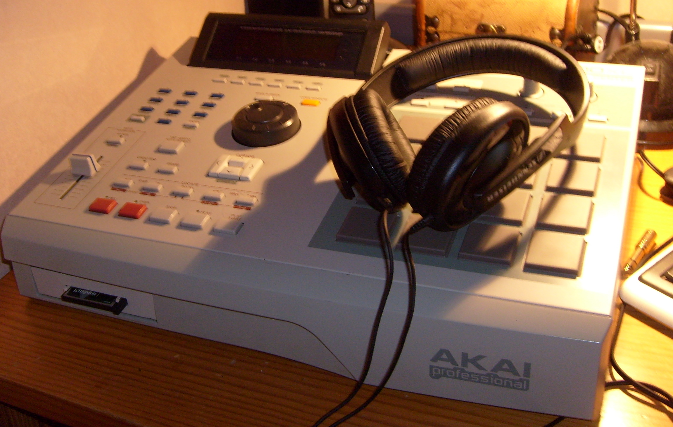 Akai MPC2000 XL